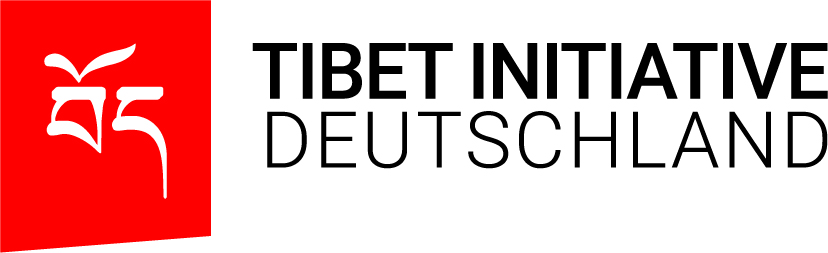 Logo der Tibet Initiative Deutschland e.V.